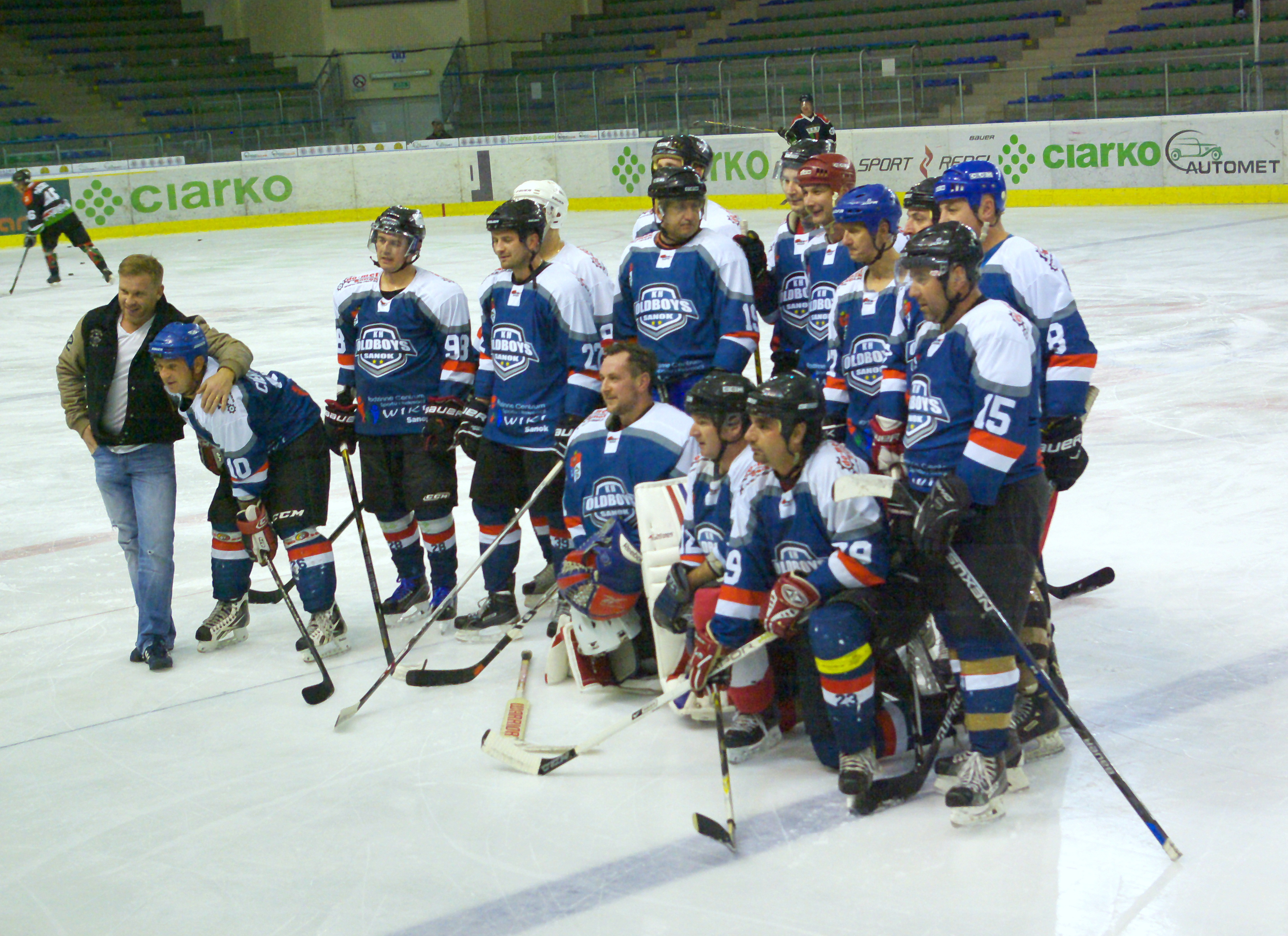 Drużyna KH Oldboys Sanok w meczu przeciw GKS Tychy (2016, Arena Sanok).